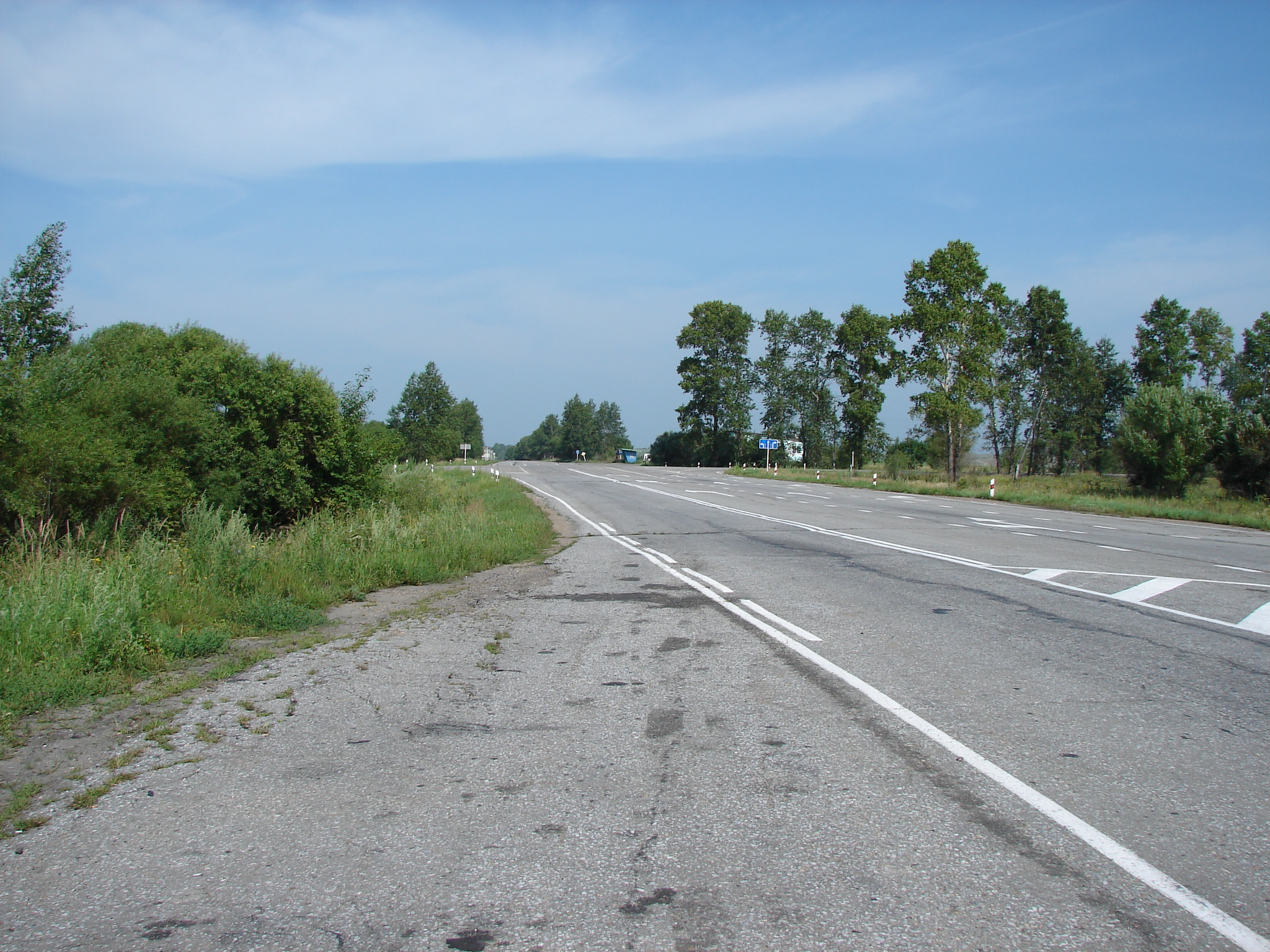 ПОЯРКОВО-БЛАГОВЕЩЕНСК-ЗАВИТИНСК